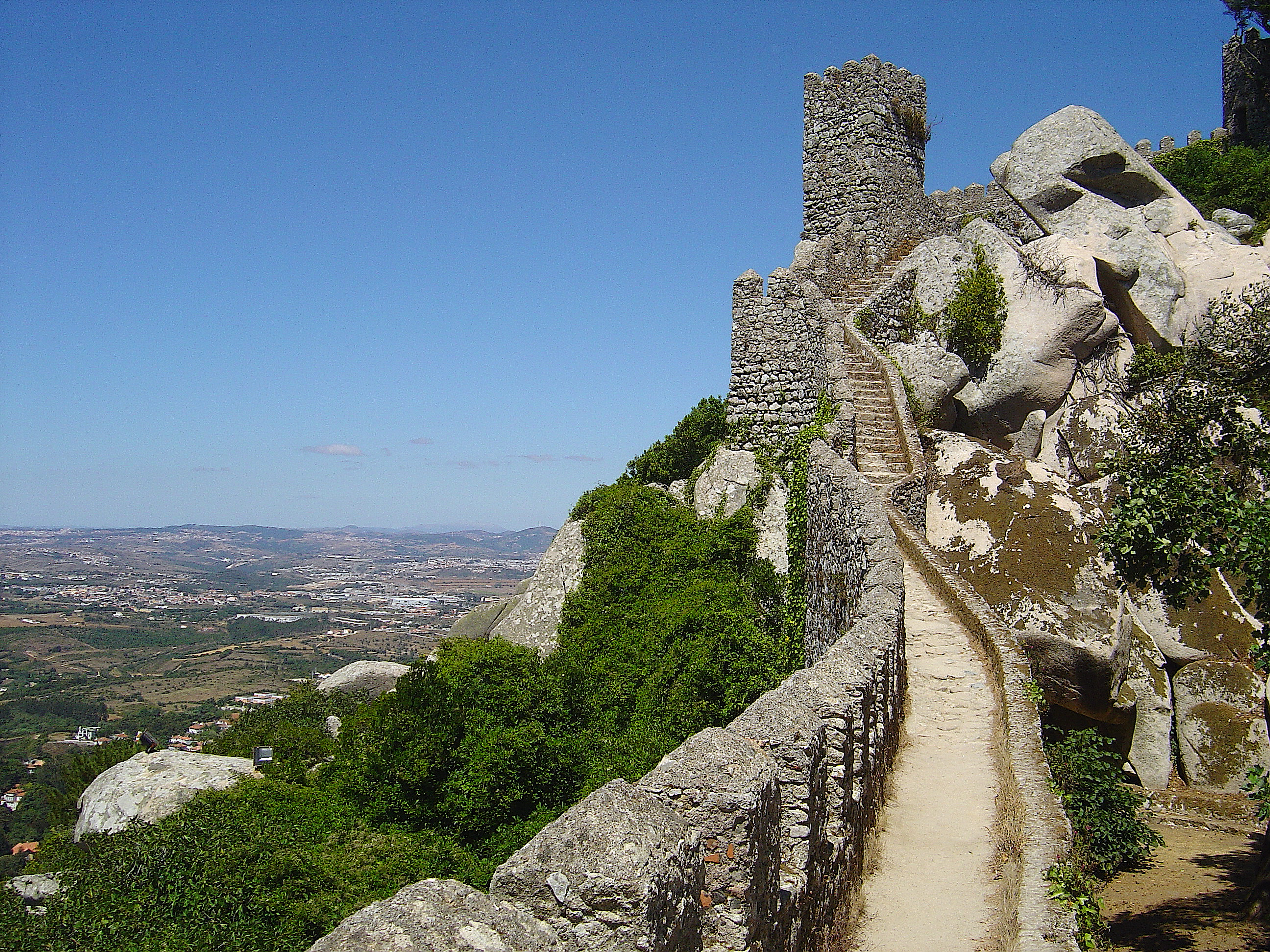 Construído pelos mouros no século VIII ou IX D.C., este Castelo está implantado em dois cumes da Serra, de onde se disfruta generoso panorama. Circundado de muralhas e diversas torres, sofreu diversas reparações em especial no período romântico (cerca de 1860), quando o rei consorte D. Fernando II de Saxe Coburgo-Gotha, o restaurou, arborizou os espaços envolventes e conferiu às velhas ruínas medievais uma outra dignidade. O Castelo foi conquistado por D. Afonso Henriques (1147), monarca a quem se deve a construção da Capela românica de S Pedro, cujos interessantes vestígios ainda sáo visíveis, junto ao «oppidum» onde há também uma cisterna, uma porta árabe «em ferra- dura» e diversas estruturas de habitação. Esta Capela preserva dois curiosos portais românicos e, na capela-mor, restos da pintura a «fresco» de sentido decorativo, bem como diversos túmulos da antiga necrópole medieval.